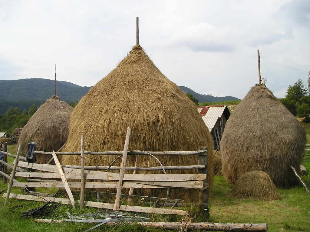 Vale Gugi